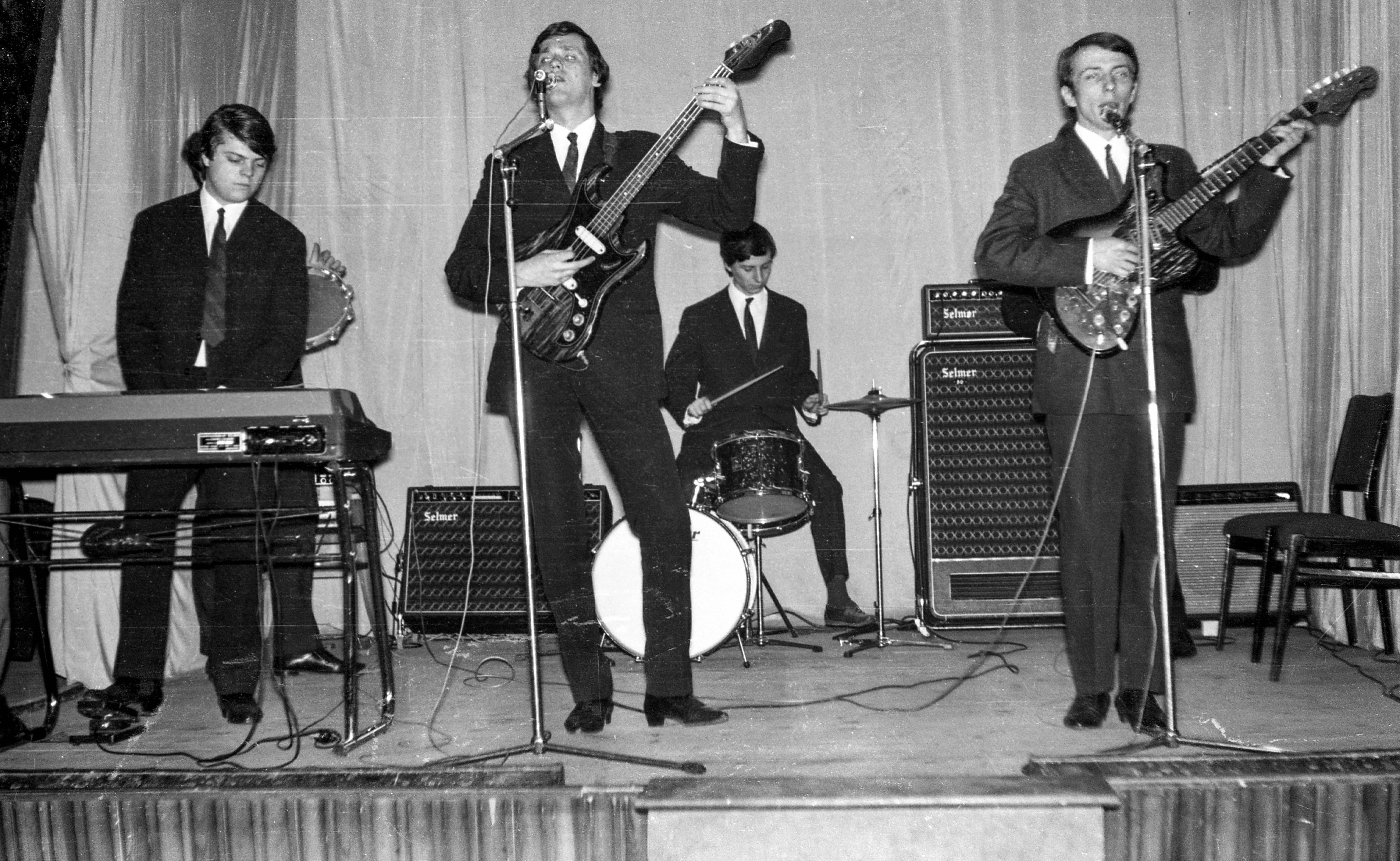 a Metró együttes koncertje. Schöck Ottó, Rédey Gábor, Veszelinov András, Zorán Sztevanovity, Dusán takarva. Location: Hungary Tags: beat era Title: a Metró együttes koncertje. Schöck Ottó, Rédey Gábor, Veszelinov András, Zorán Sztevanovity, Dusán takarva.